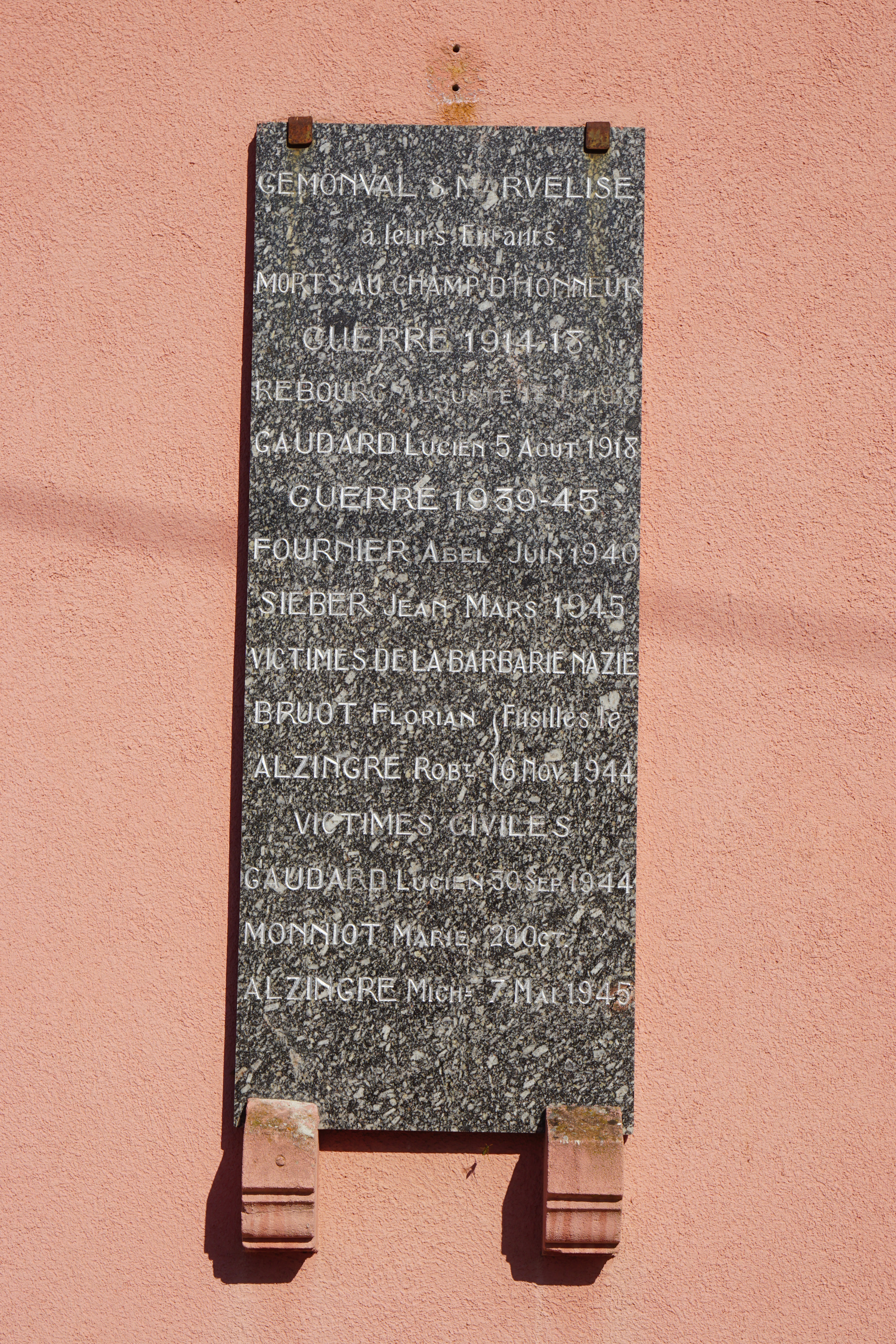 Plaque commémorative de Gémonval.